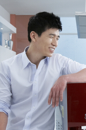 LG전자 헬스케어 정수기 모델로 활동하고 있는 션과 정혜영 부부 광고 사진